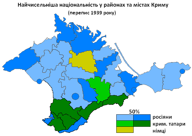 Найчисельніша національність у районах та містах Криму за даними перепису 1939 р. / Largers ethnic group in raions and cities of Crimea in 1939